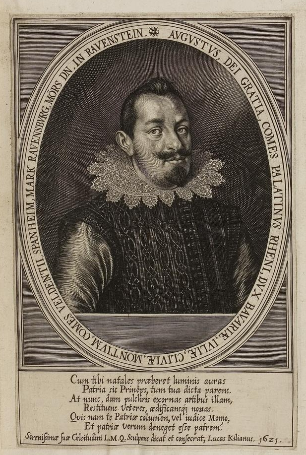 Grafik aus dem Klebeband Nr. 1 der Fürstlich Waldeckschen Hofbibliothek Arolsen Motiv: August von Pfalz-Sulzbach (1582–1632), Pfalzgraf und Herzog von Sulzbach